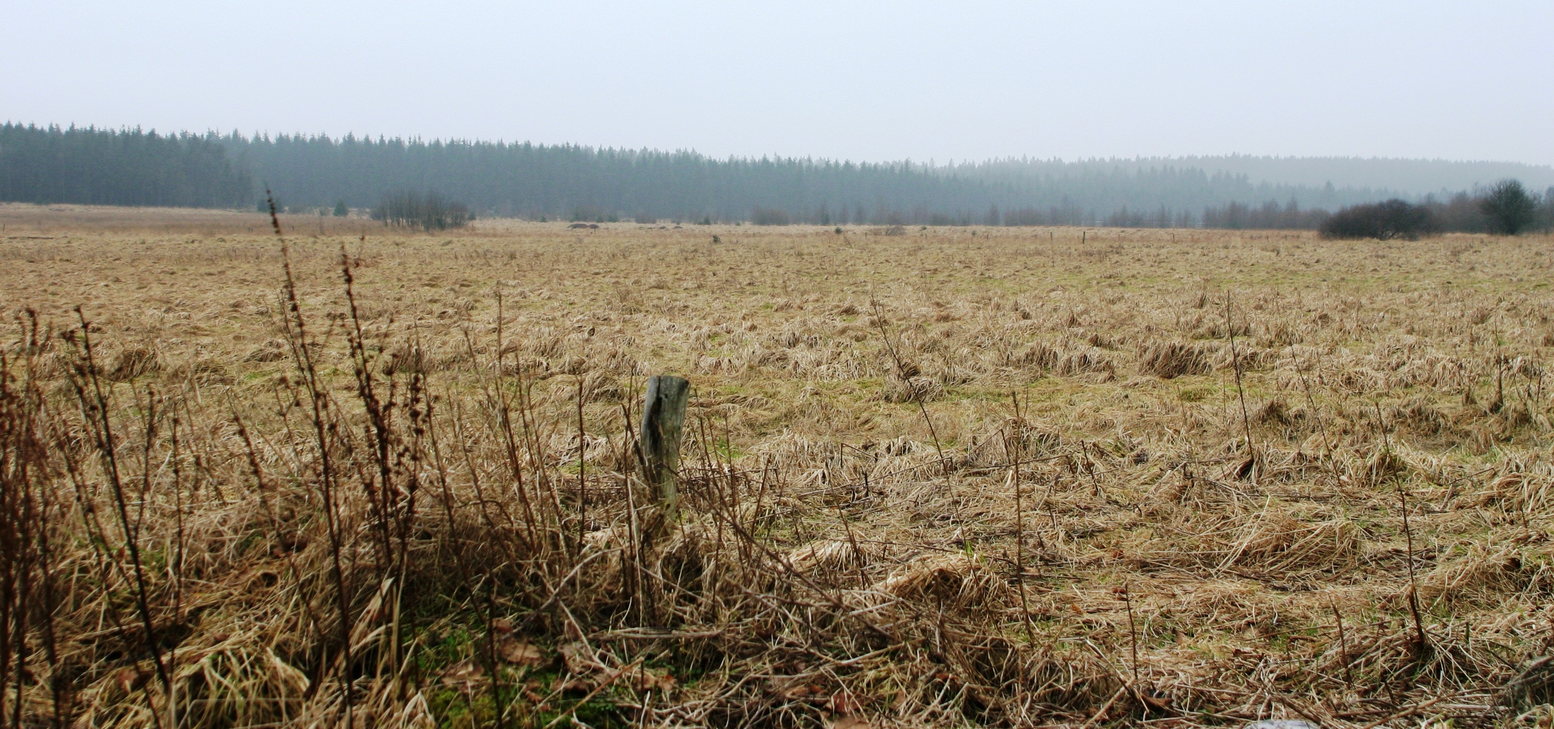 Mont_Rigi_Fagne_de_la_Poleûr.